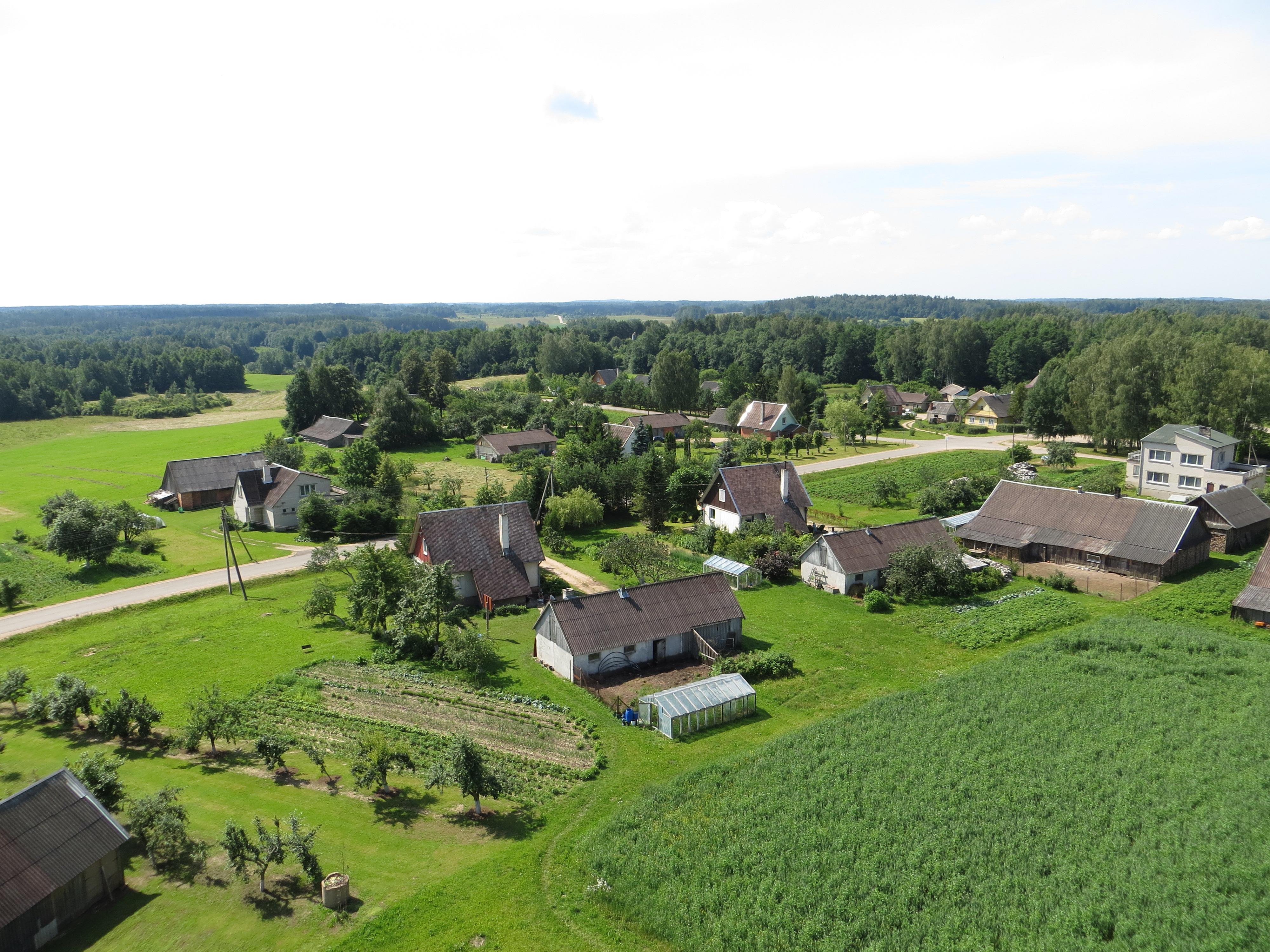 Baibiai, Lithuania